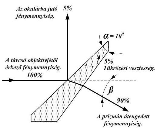 Az ékprizma működésének vázlatos rajza